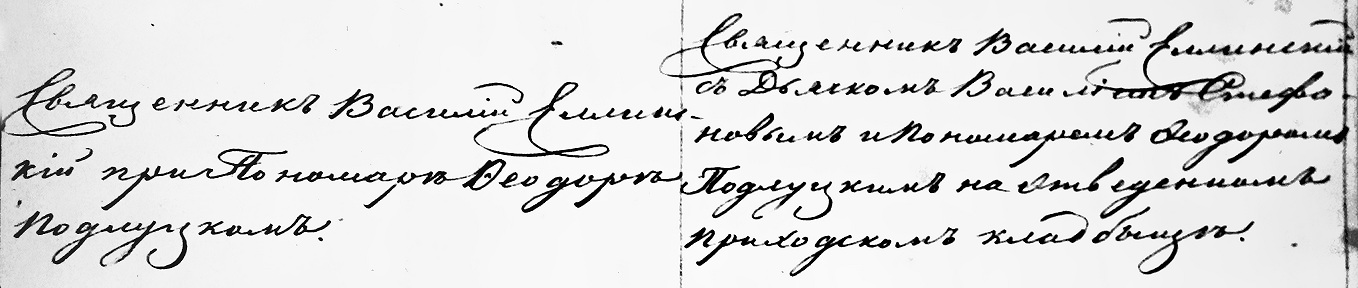 дещо про поховання Михайла Петренка з метричної книги Миколаївської церкви Лебедина